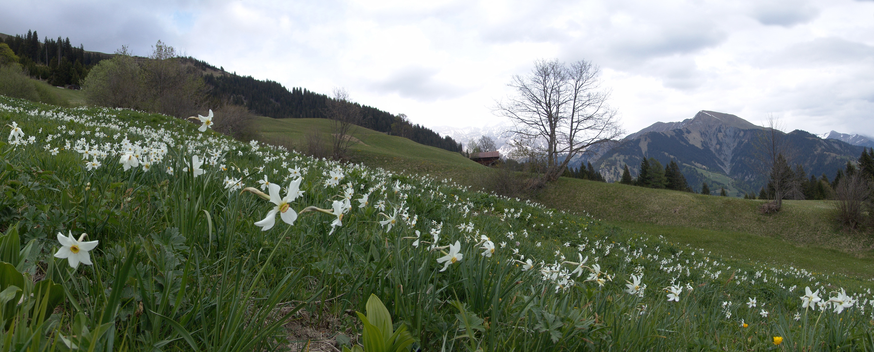 Schmalblättrige Narzisse (Narcissus radiiflorus). Aufgenommen in der Schweiz am Südhang des Vilan, Gemeindegebiet Seewis im Prättigau.